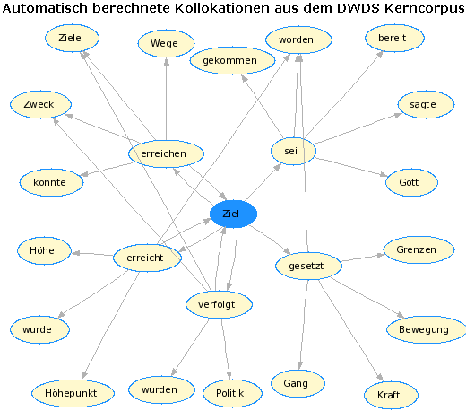 großer Kollokationsgraph für "Ziel" aus dem DWDS-Kerncorpus